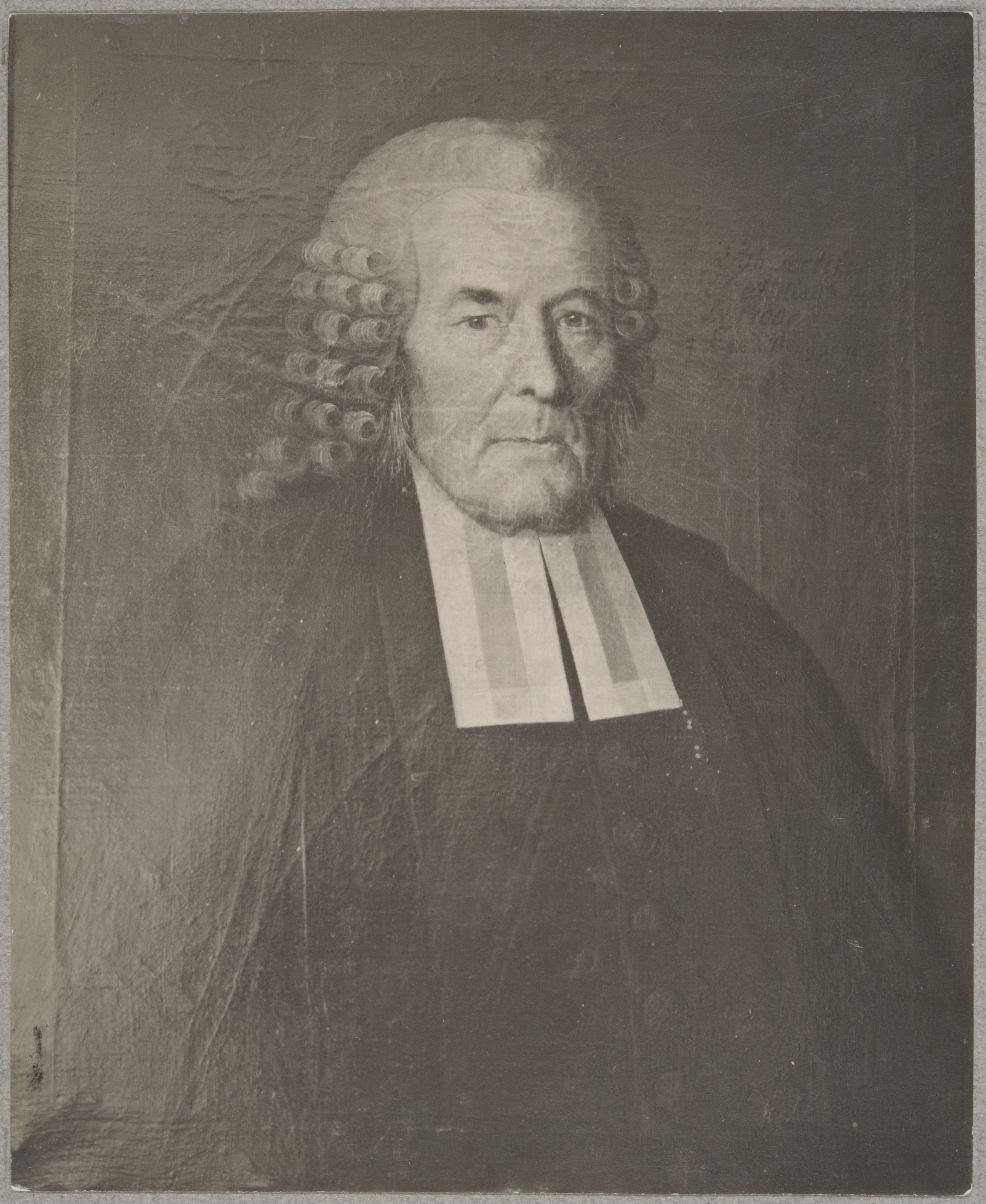 Porvoon hiippakunnan piispa Gabriel Fortelius, alunperin Nils Schillmarkin öljymaalaus vuodelta 1782